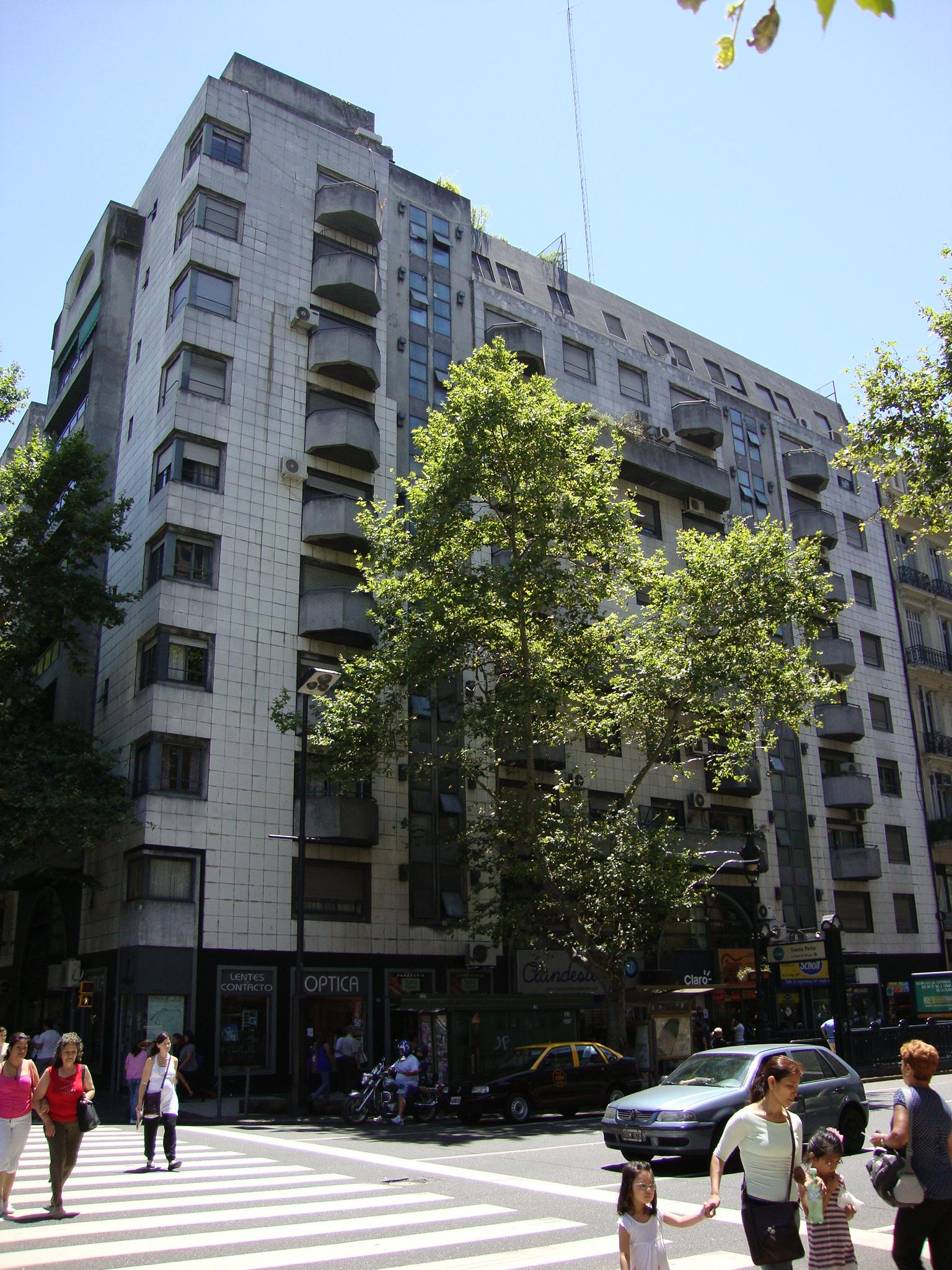 Vista del edificio de la calle Presidente Luis Sáenz Peña nº 20 (Korn & Lopatín, 1983) desde la Avenida de Mayo.